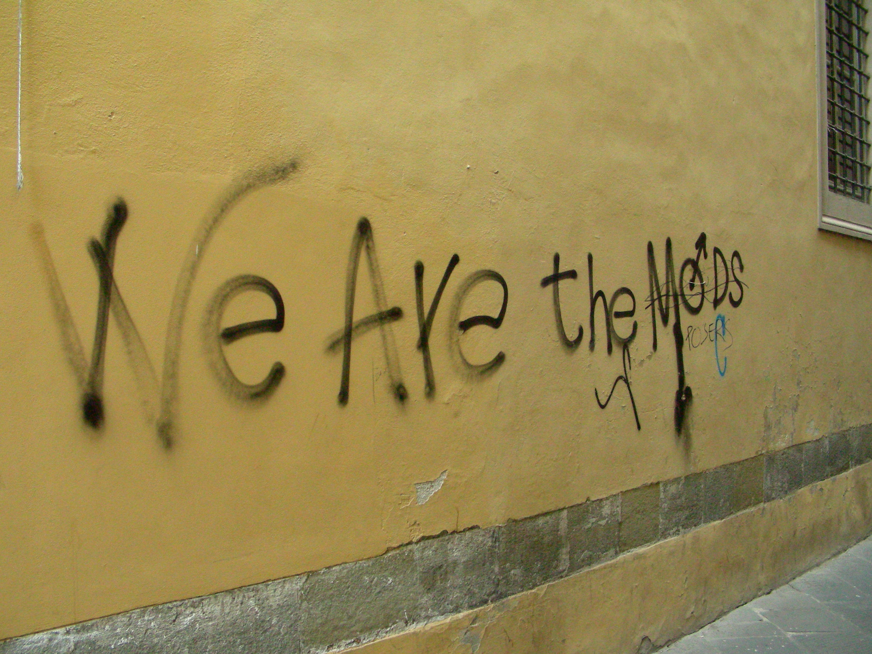 graffiti in lucca (stad)